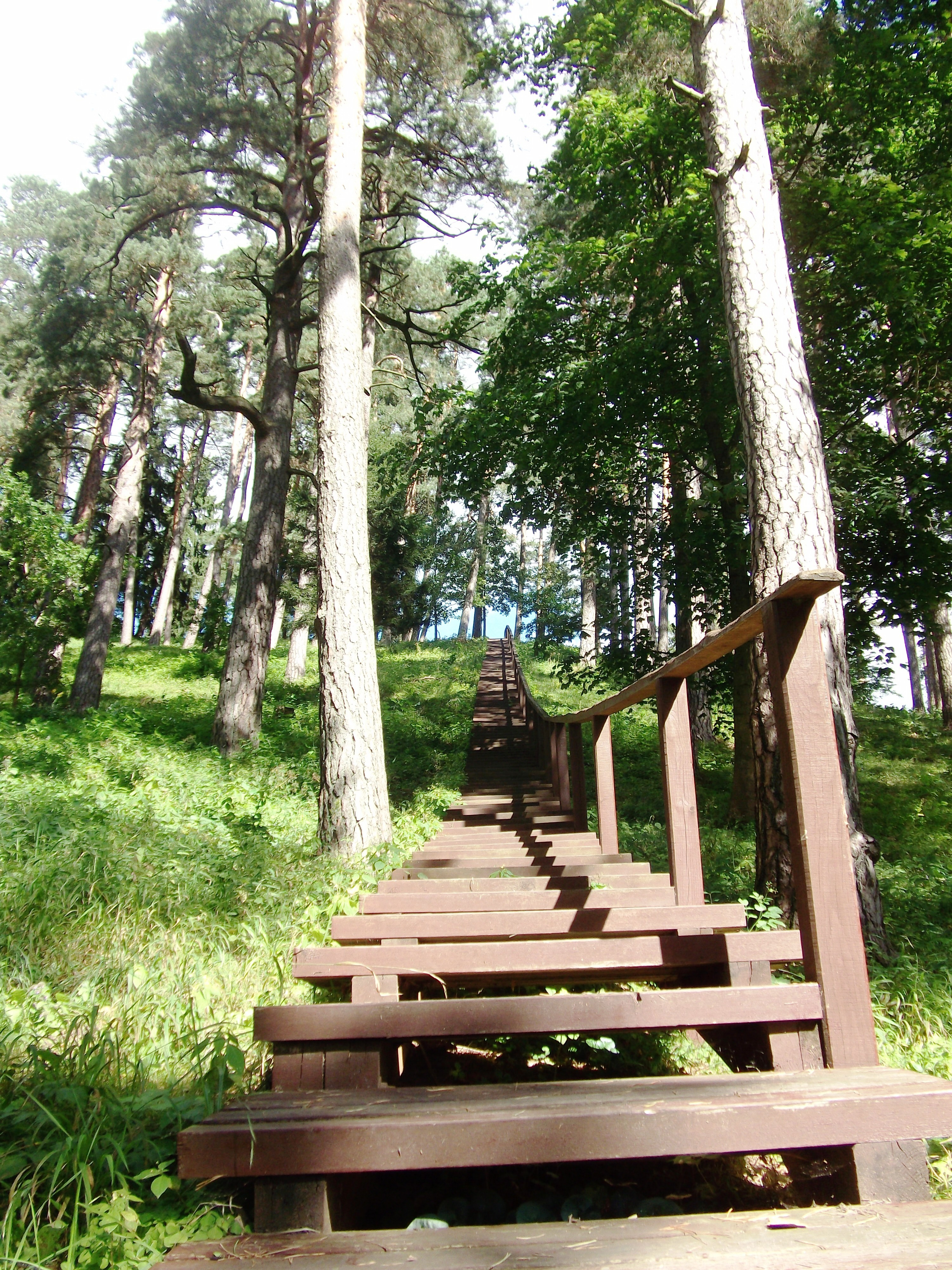 Kartuvių kalnas, Aukštadvaris, Trakų raj.